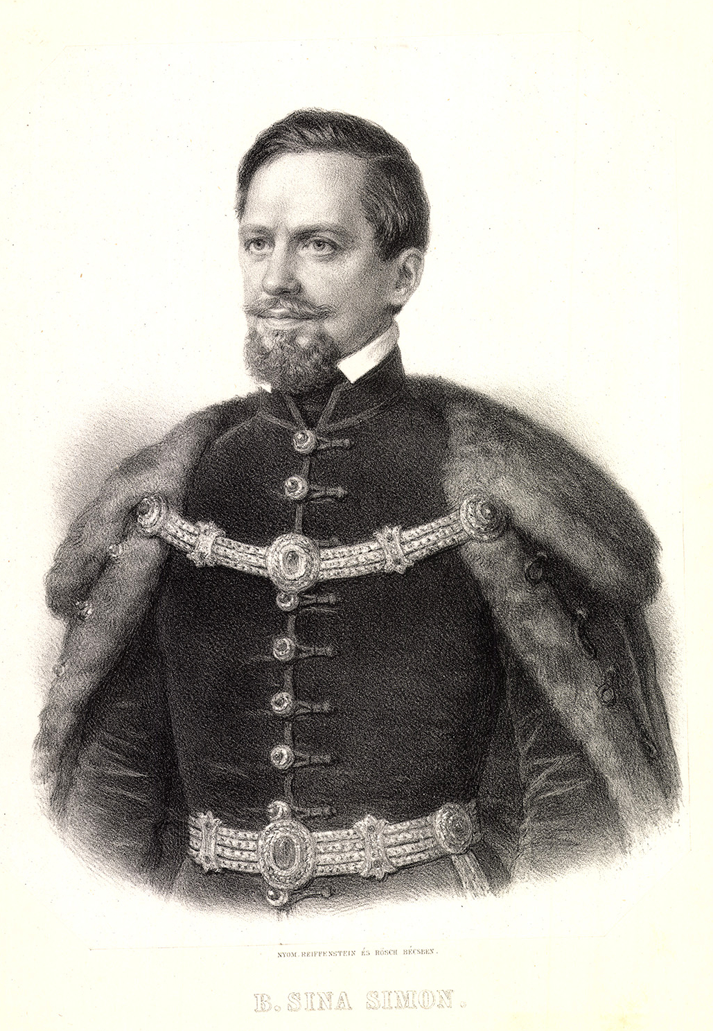 Báró hodosi és kizdiai Sina Simon (Bécs, 1810. augusztus 15. – Bécs, 1876. április 15.) aromán származású osztrák földbirtokos, diplomata és mecénás.